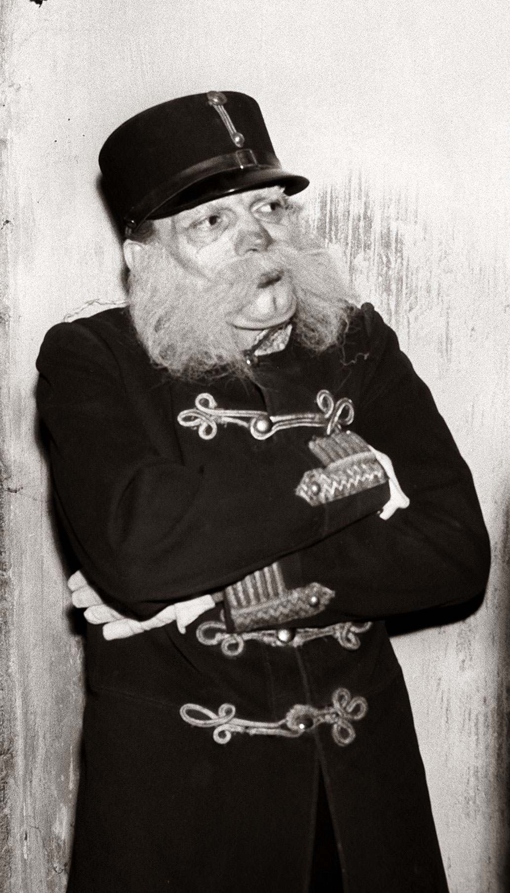 Frane Milčinski - Ježek kot Franc Jožef